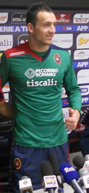 Željko Brkić con la maglia del Cagliari